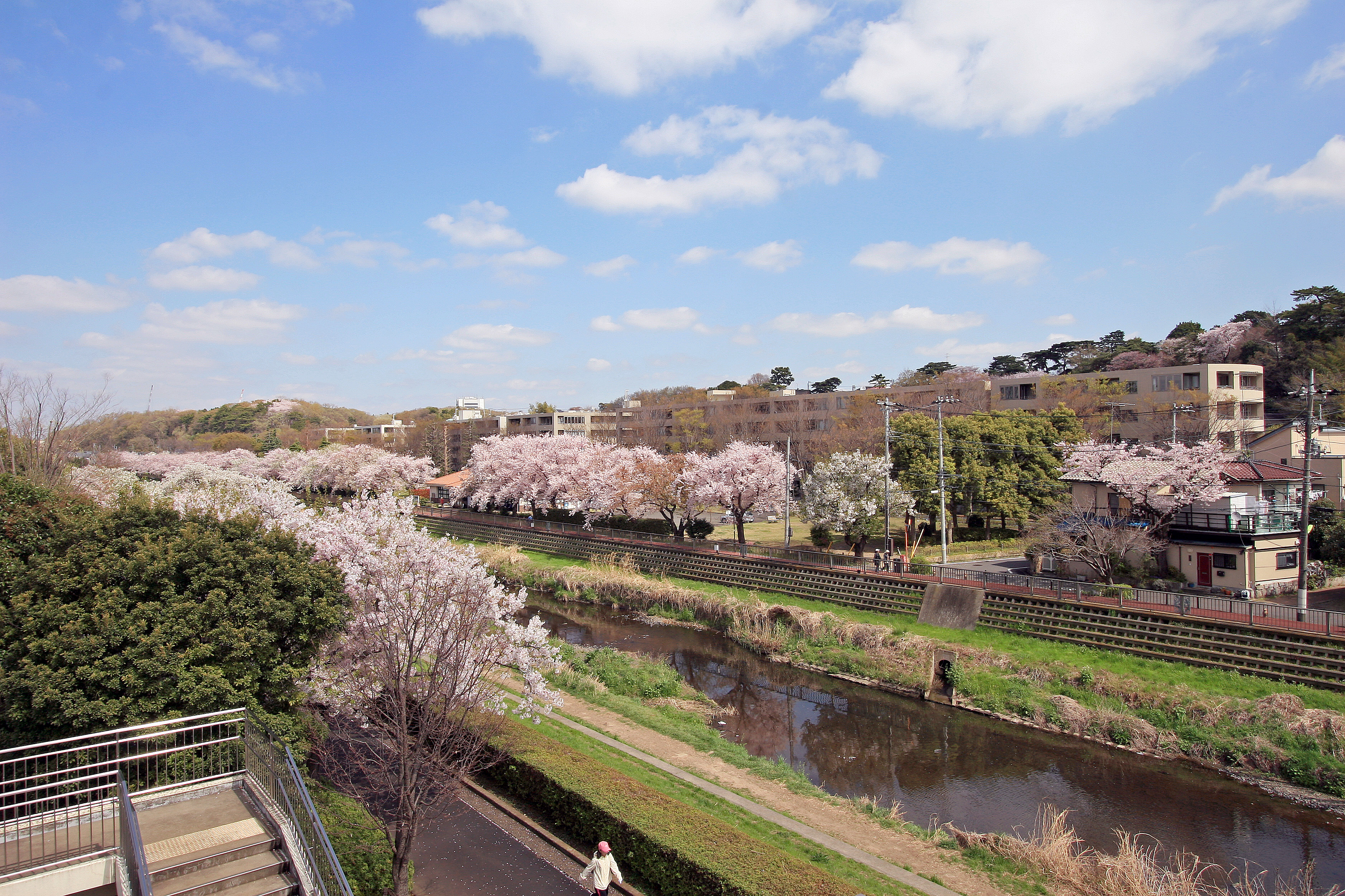 世田谷区 きたみふれあい広場 201504021017